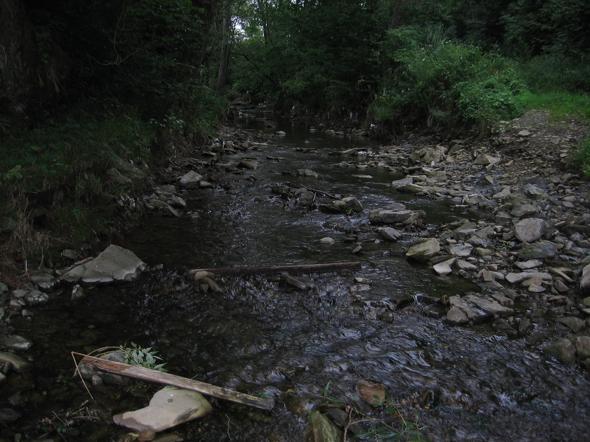 Ondava in the village of Nizna Polianka, Bardejov county, Slovakia. Ondava we wsi Nizna Polianka, powiat bardejovski, Słowacja.